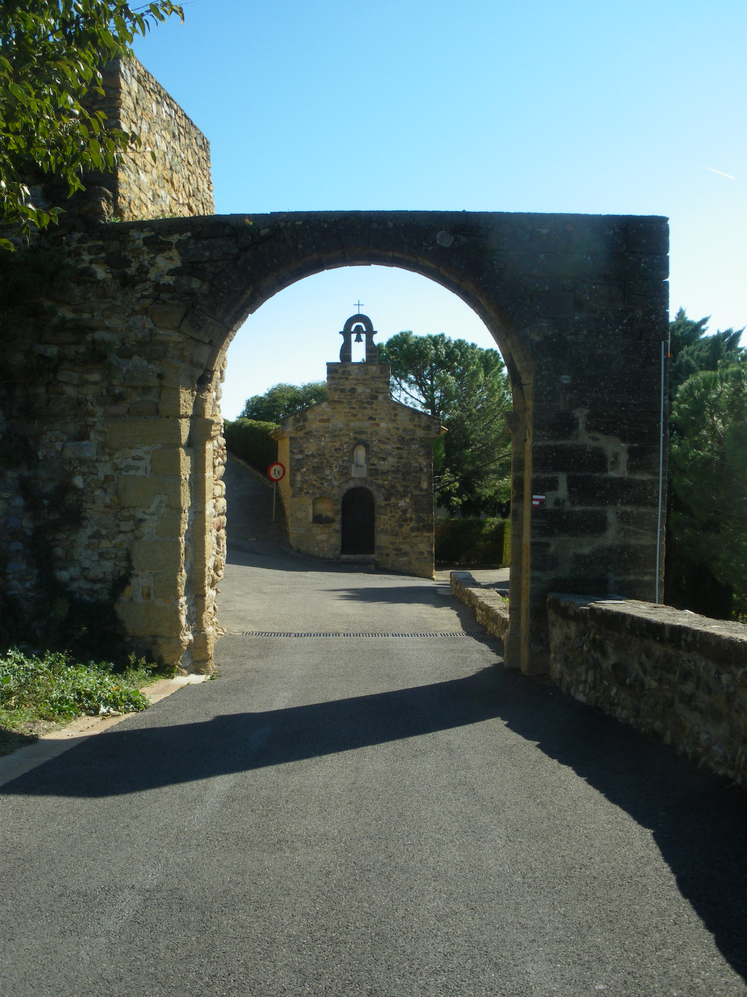 Chapelle à Carainne, Vaucluse, France